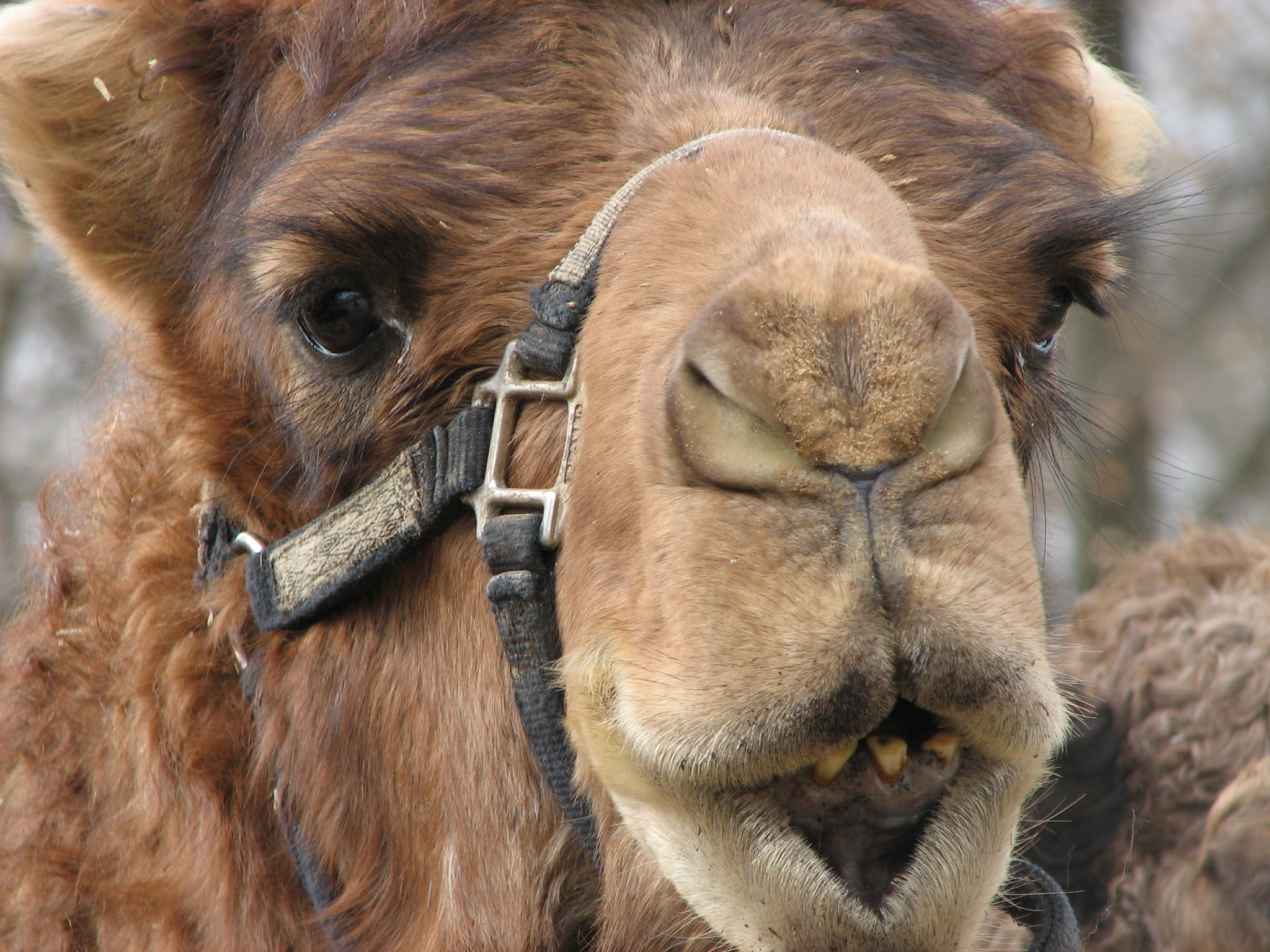 Camelus dromedarius